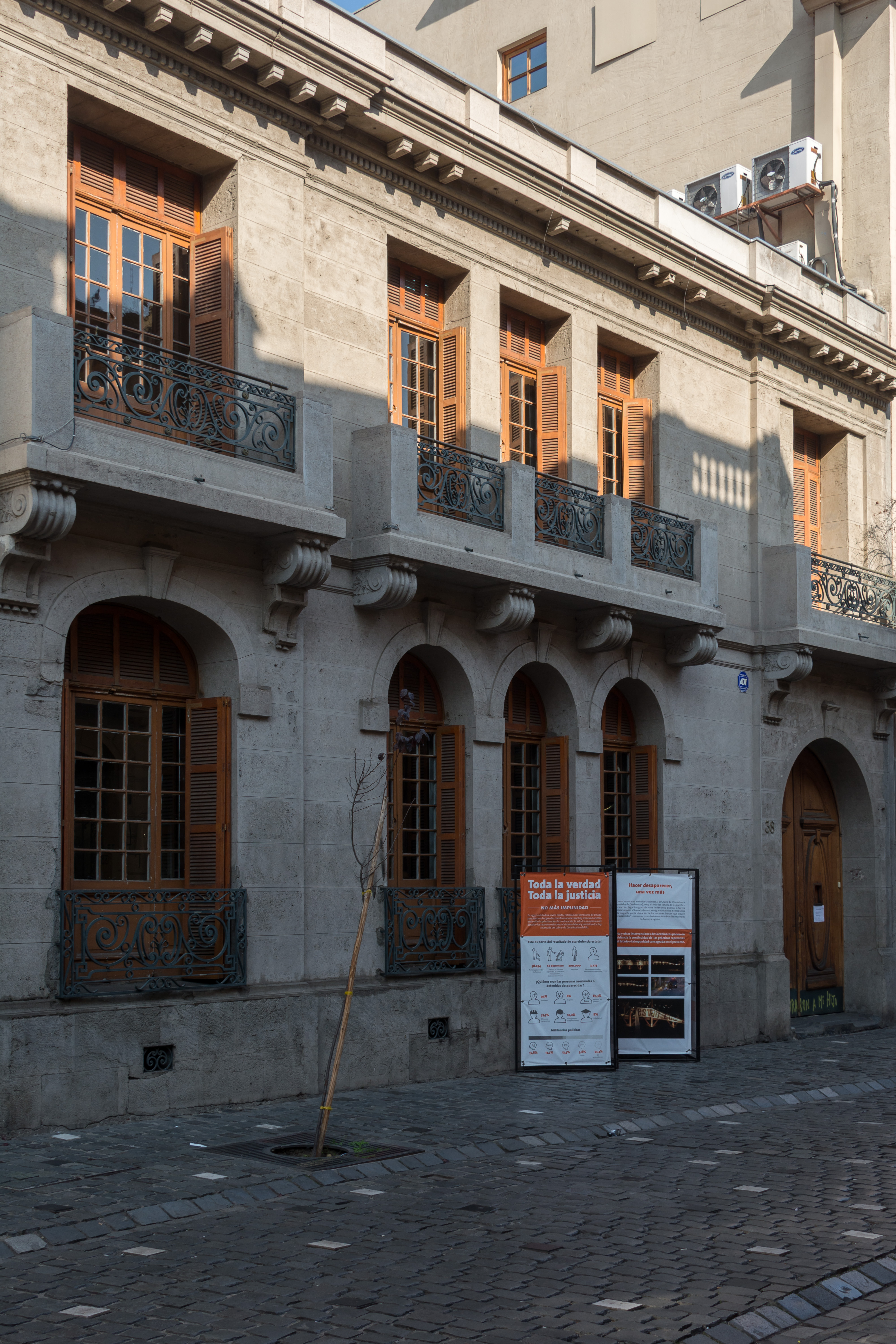 Londres 38, Santiago, Región Metropolitana de Santiago, Chile